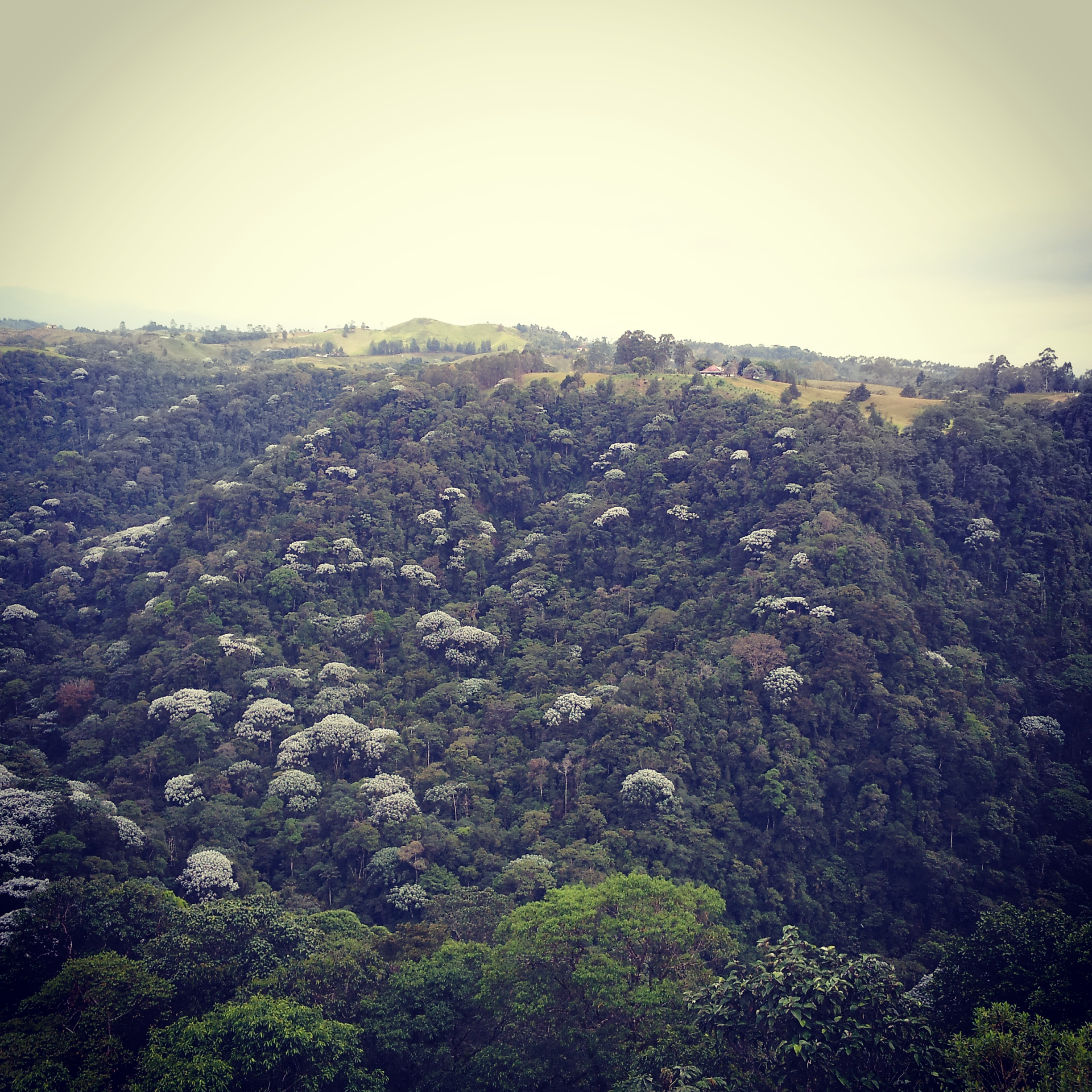 La reserva Barbas Bremen se encuentra localizada entre los municipios de Filandia, Circasia, Salento (Quindío) y Pereira (Risaralda). Entre los atractivos de la reserva están la gran biodiversidad de aves lo que favorece el avistamiento, también se pueden observar manadas de monos aulladores. Esta fotografía fue tomada en un área protegida de Colombia con el código 416 del RUNAP.